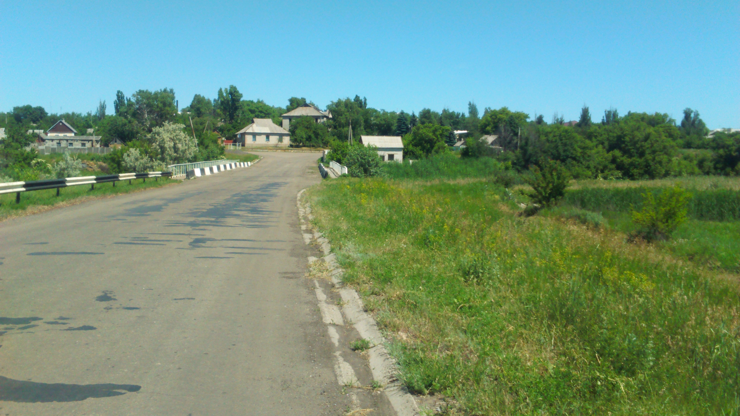 Добропі́лля — село в Україні, Добропільському районі Донецької області, над річкою Водяна.